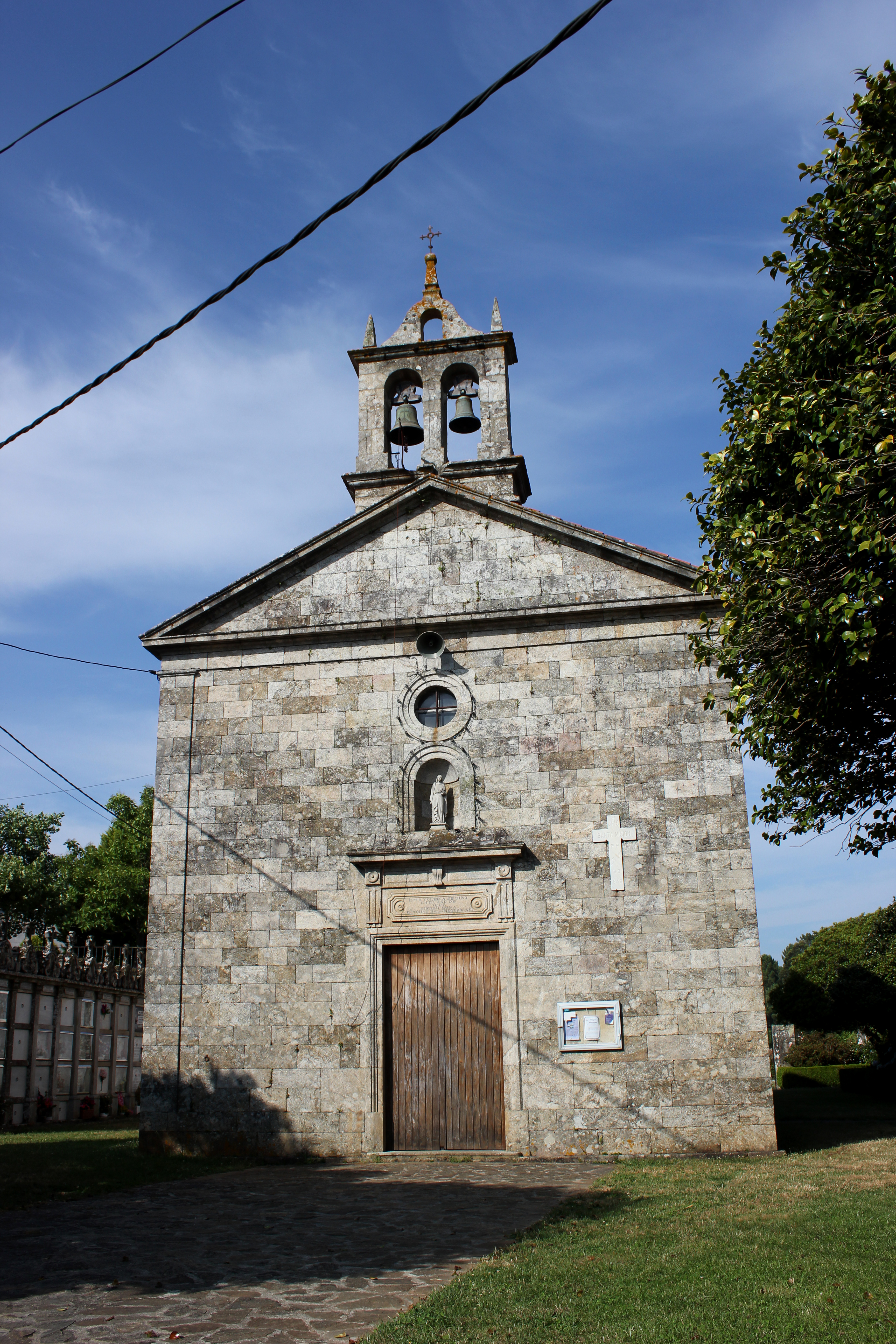 Igrexa de Codeso no concello de Boqueixón.